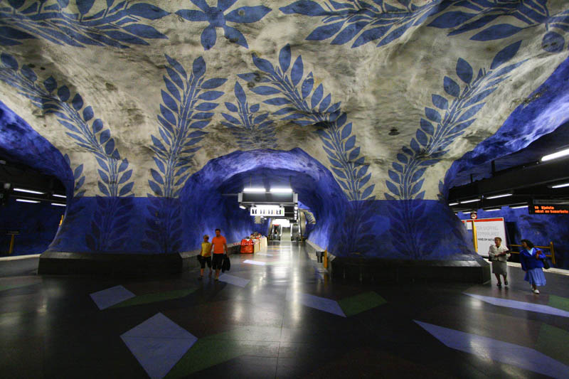 T-Centralen, Stockholm, Sweden